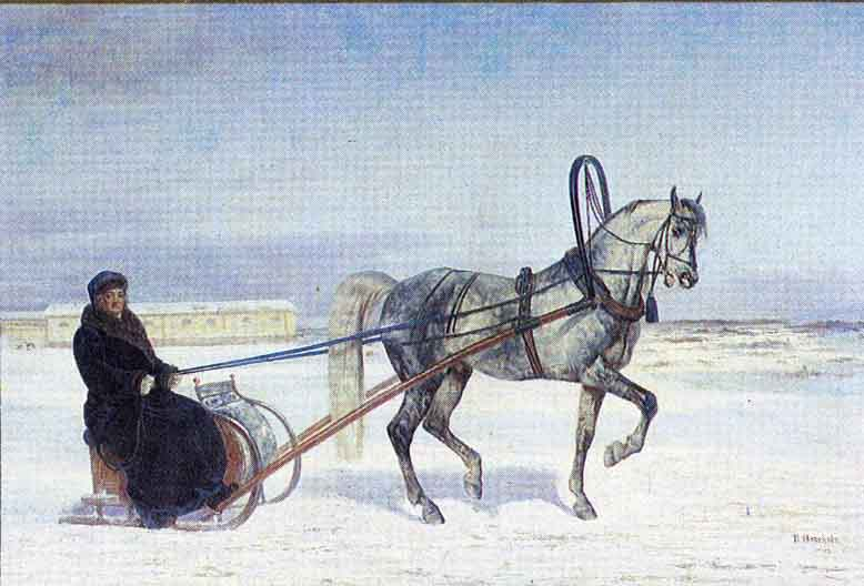 Orlov gróf és Barsz I, az orlov ügető fajta alapítóőse